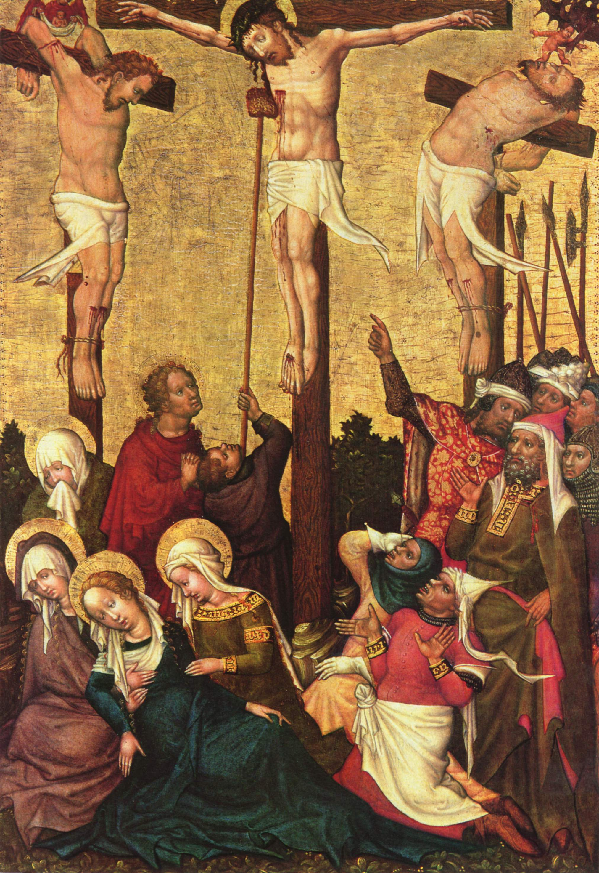 Tafelbild (Flügelretabel)